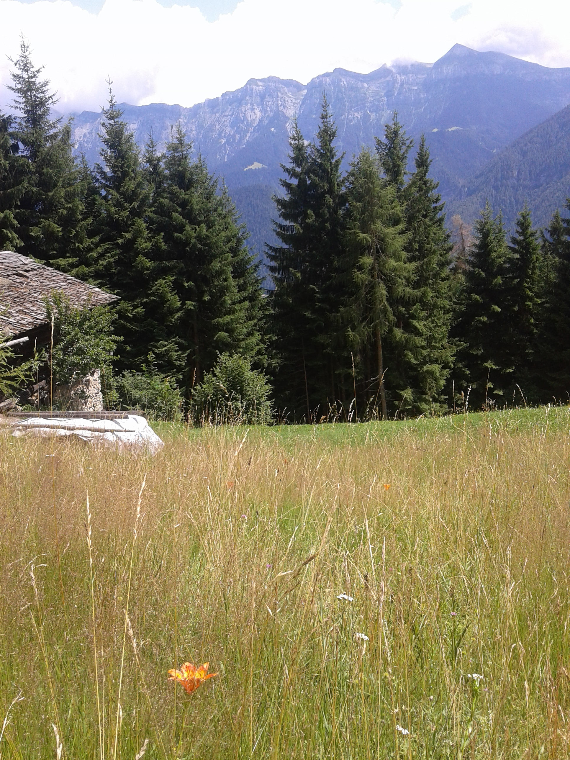 Un maso di montagna nel prato più a nord del comune di Imèr I. Si vede in primo piano un giglio rosso (Lilium bulbiferum), pianta proibita, e sullo sfondo le montagne delle Vette feltrine, di cui la più a destra è il monte Pavione.